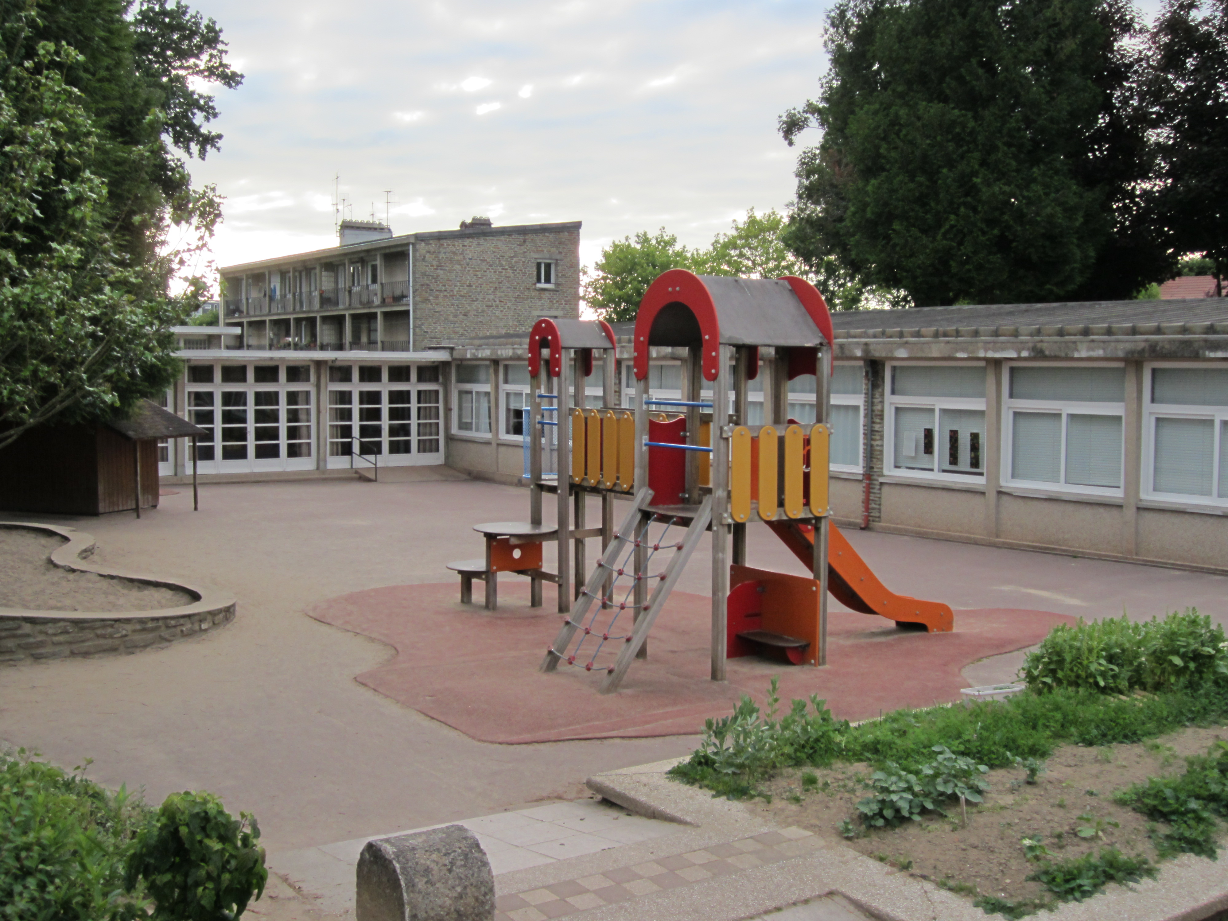 Saint-Lô, École Raymond Brulé ou École du Bouloir